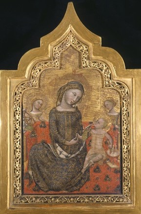 Maria mit dem Kind und den beiden Heiligen Katharina (li.) und Agnes